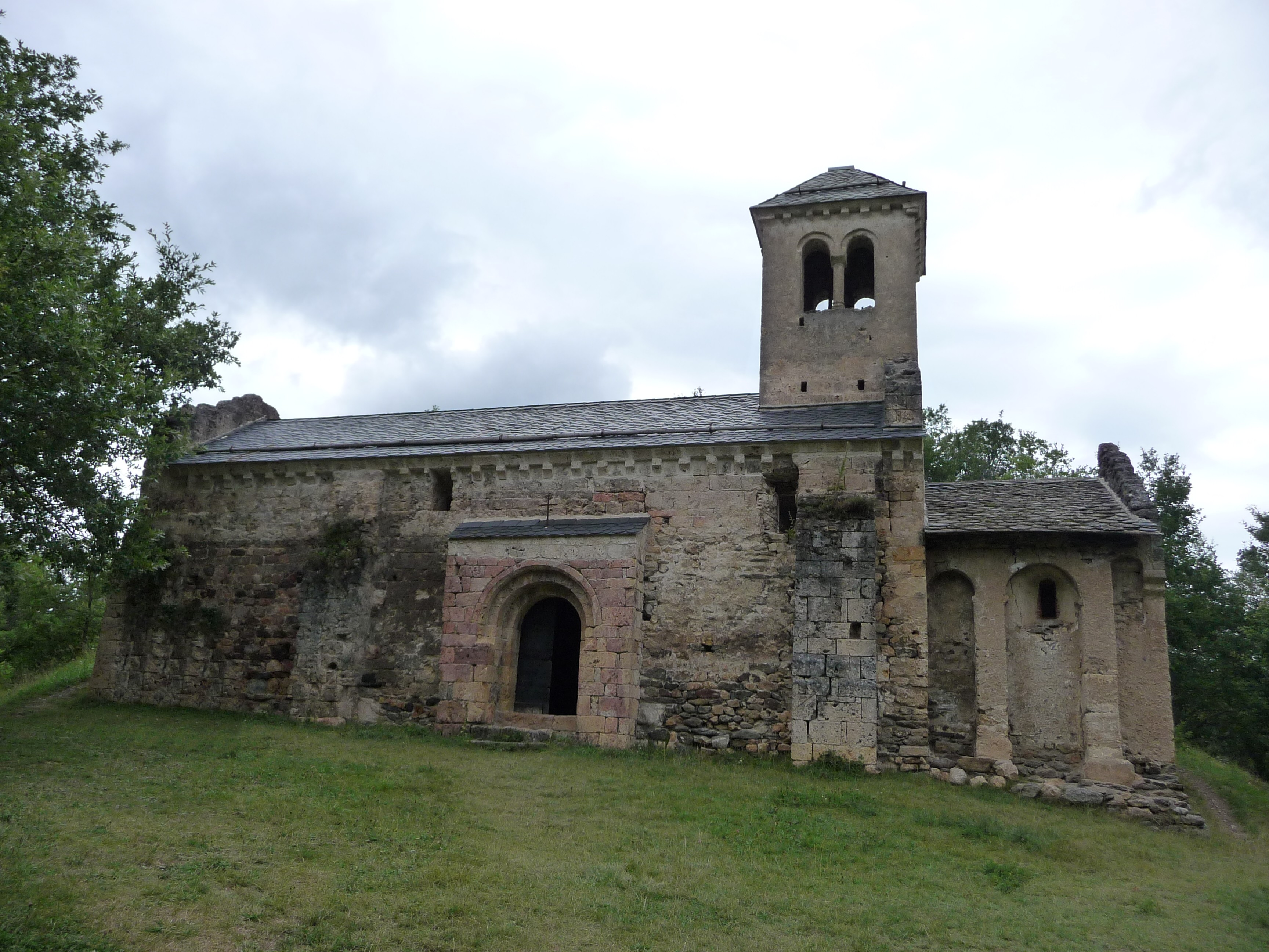 Chapelle romane Saint-Paul d'Arnave, considérée comme une des plus anciennes du département d'Ariège. L'édifice, situé au-dessus du village, remonte au Xe et XIe siècle.